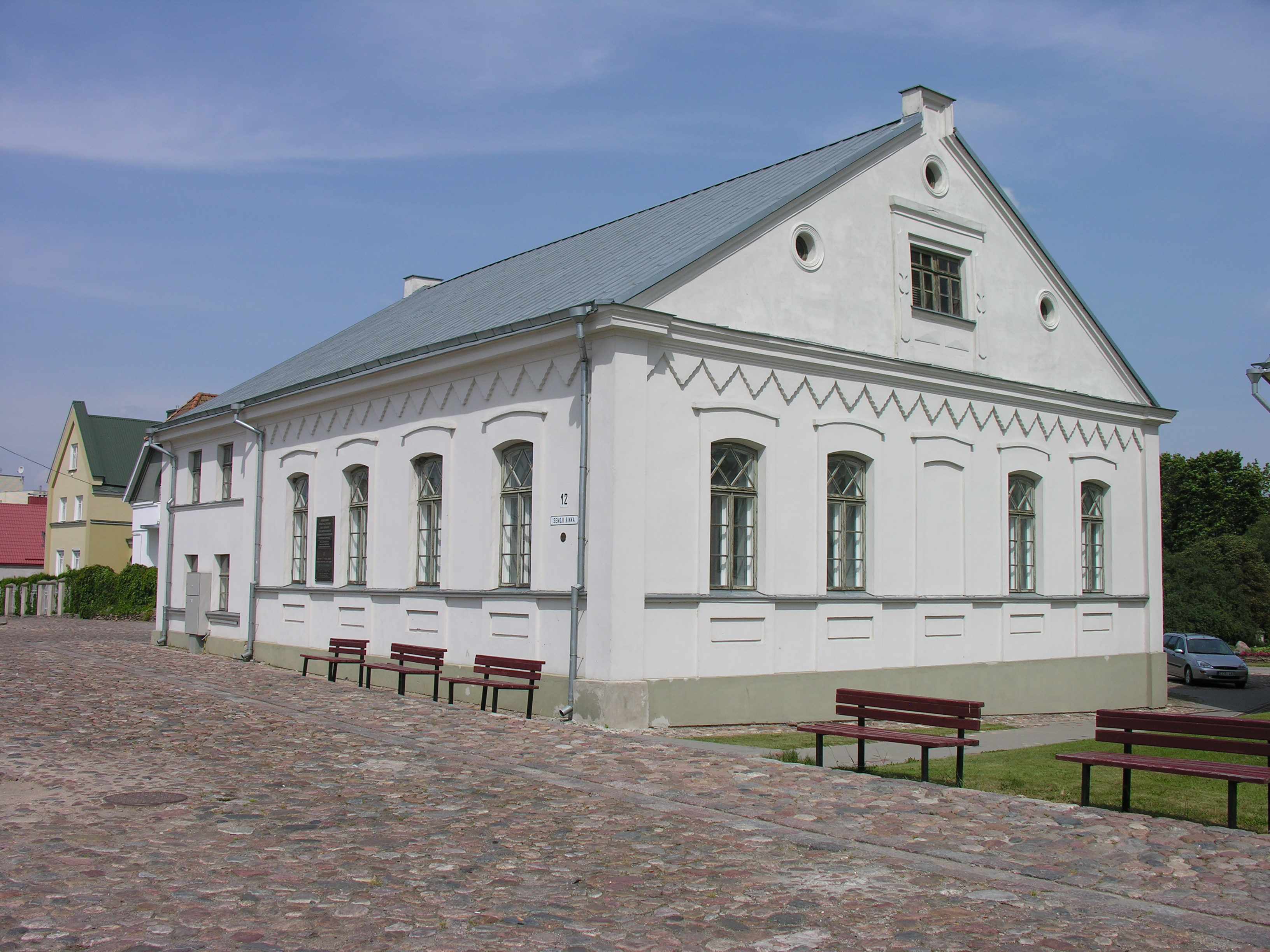 Nowa Synagoga w Kiejdanach